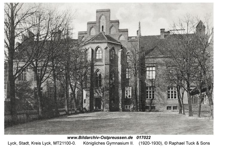 Das alte Lycker Gymnasium in der späteren Hindenburgstraße